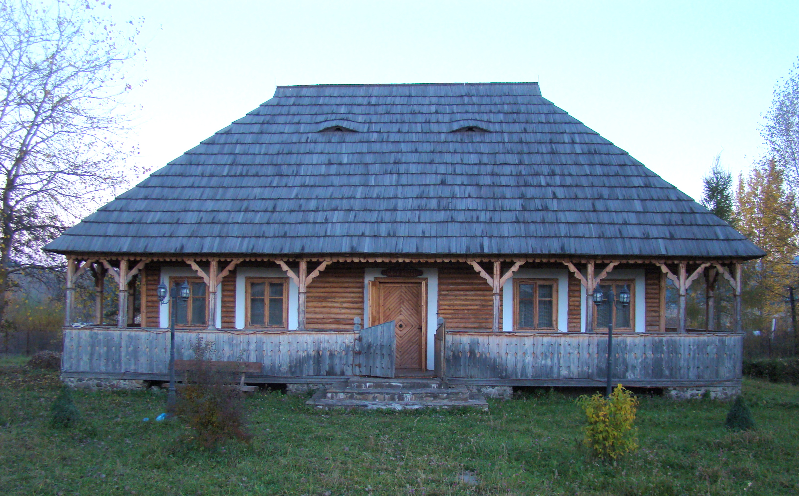 Muzeul satului din localitatea Poiana Stampei, județul Suceava